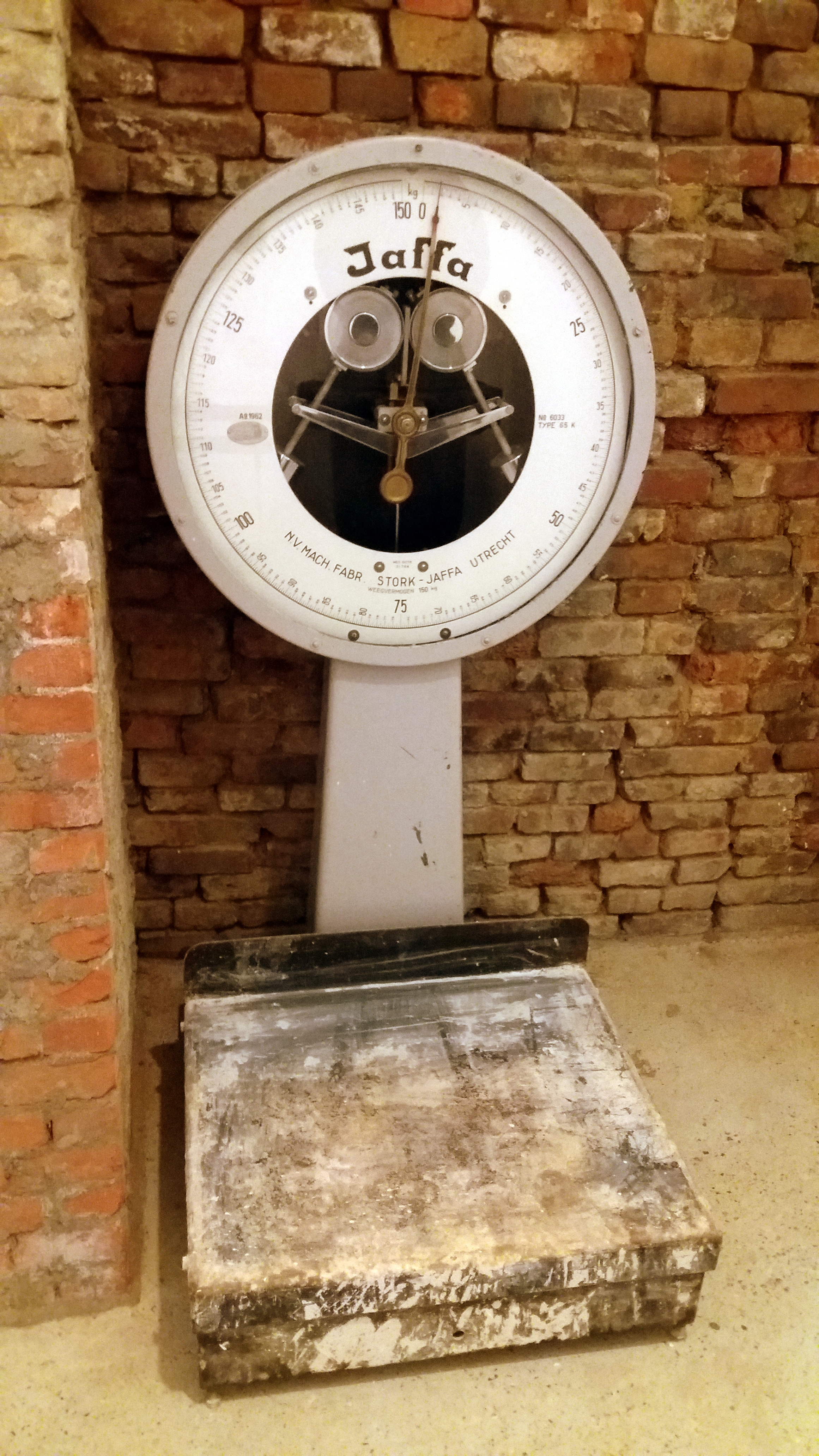 Weegschaal gefabriceerd bij de machinefabriek Jaffa te Utrecht